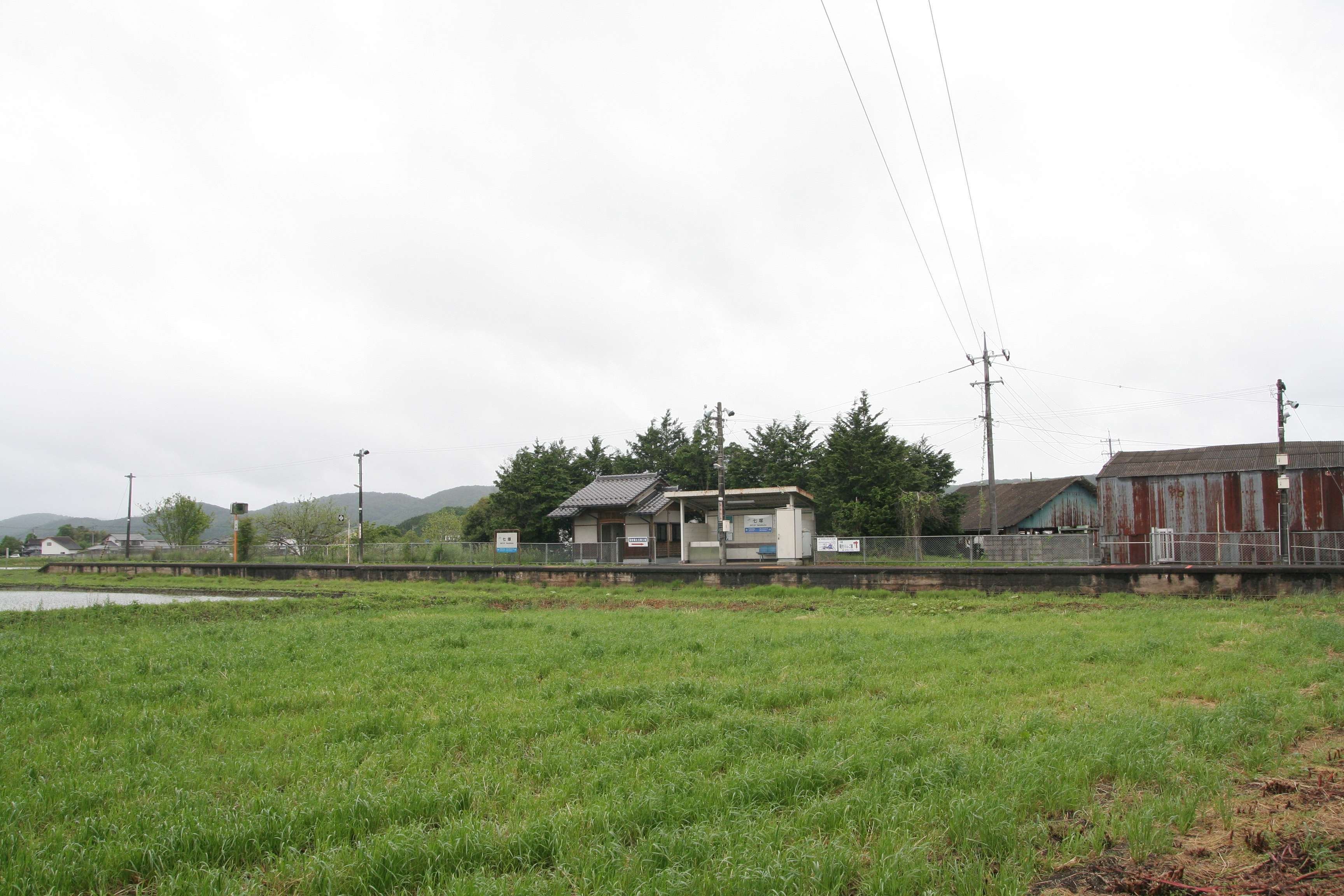 JR西日本 芸備線、七塚駅の駅全体の様子